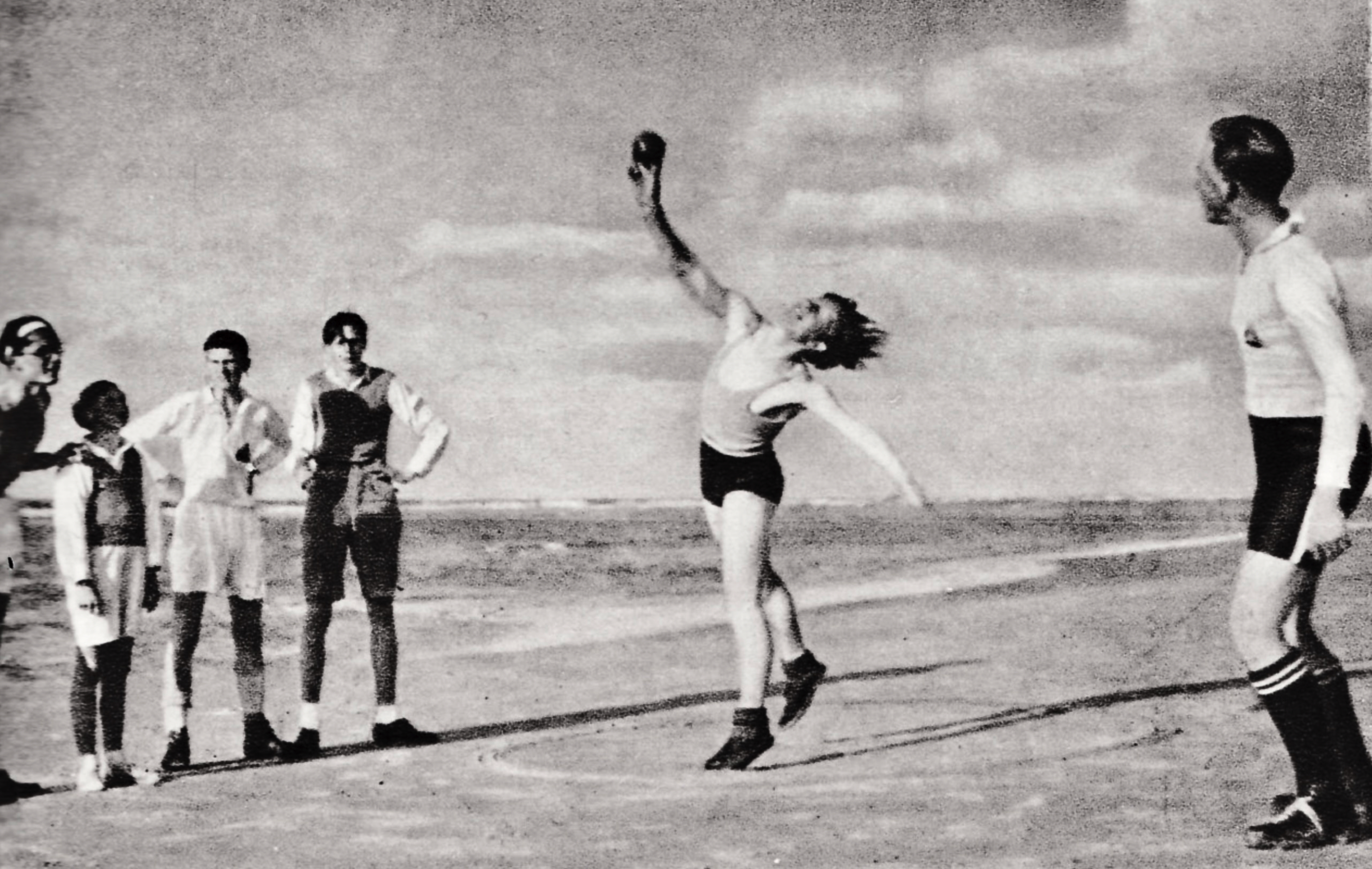 Schüler der 'S.a.M.' üben das Kugelstoßen am Strand. Der Wurfkreis musste lediglich im Sand markiert werden, während die Wurfergebnisse leicht anhand der Spuren im Sand abgelesen bzw. gemessen werden konnten.